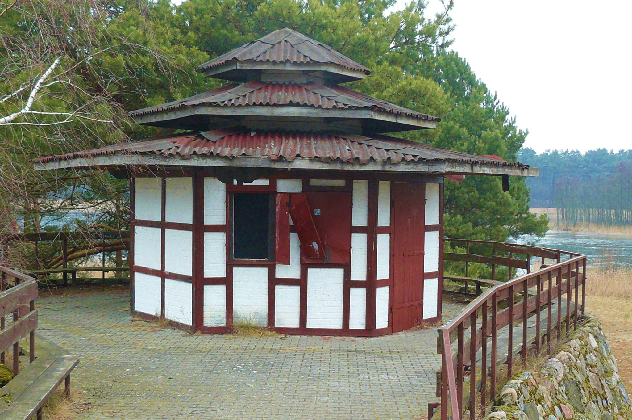 Biała w gm. Wieleń.